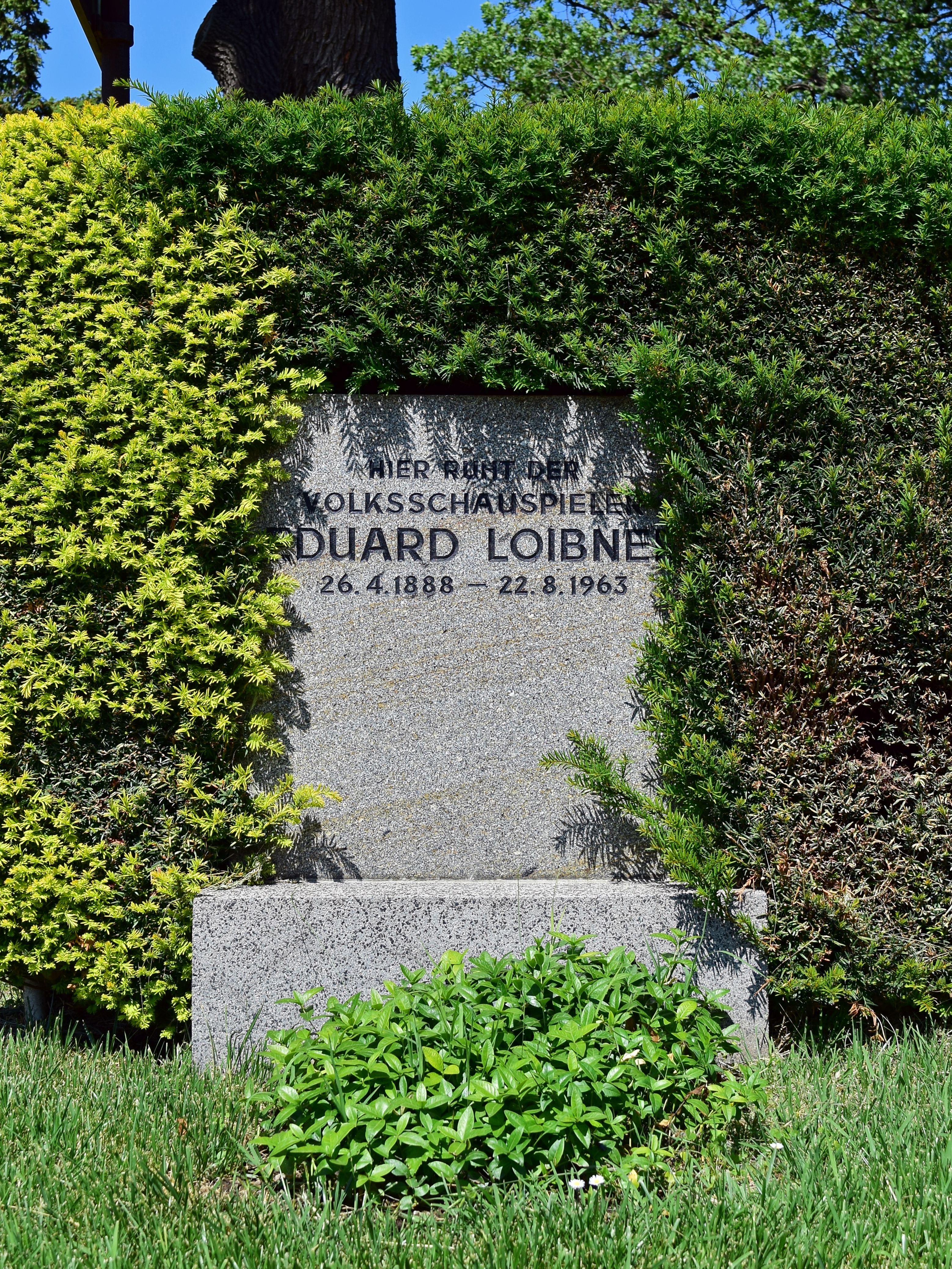 Ehrenhalber gewidmetes Grab von Eduard Loibner auf dem Urnenhain der Feuerhalle Simmering, Gruppe 1, Abt. 1, Ring 3, Nr. 2